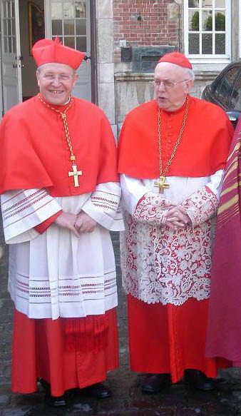 Kardinaal Godfried Danneels en Walter Kasper in koorkkledij voor de Processie van het H. Bloed te Brugge.